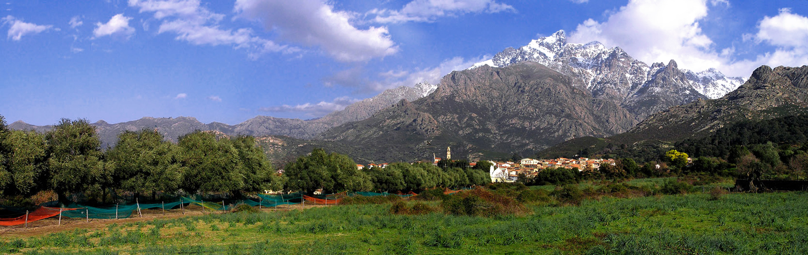 Village de Calenzana - vue panoramique